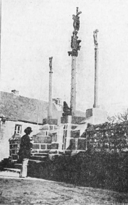 Le calvaire de Saint-Divy en 1910 (Bulletin de la Société Académique de Brest)